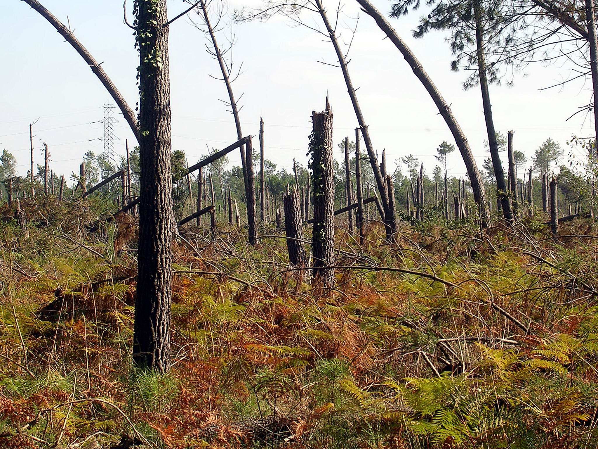 Dégâts provoqués par la tempête Klaus sur la forêt des Landes (ici, à Saint-Pierre-du-Mont, dans le département français des Landes)